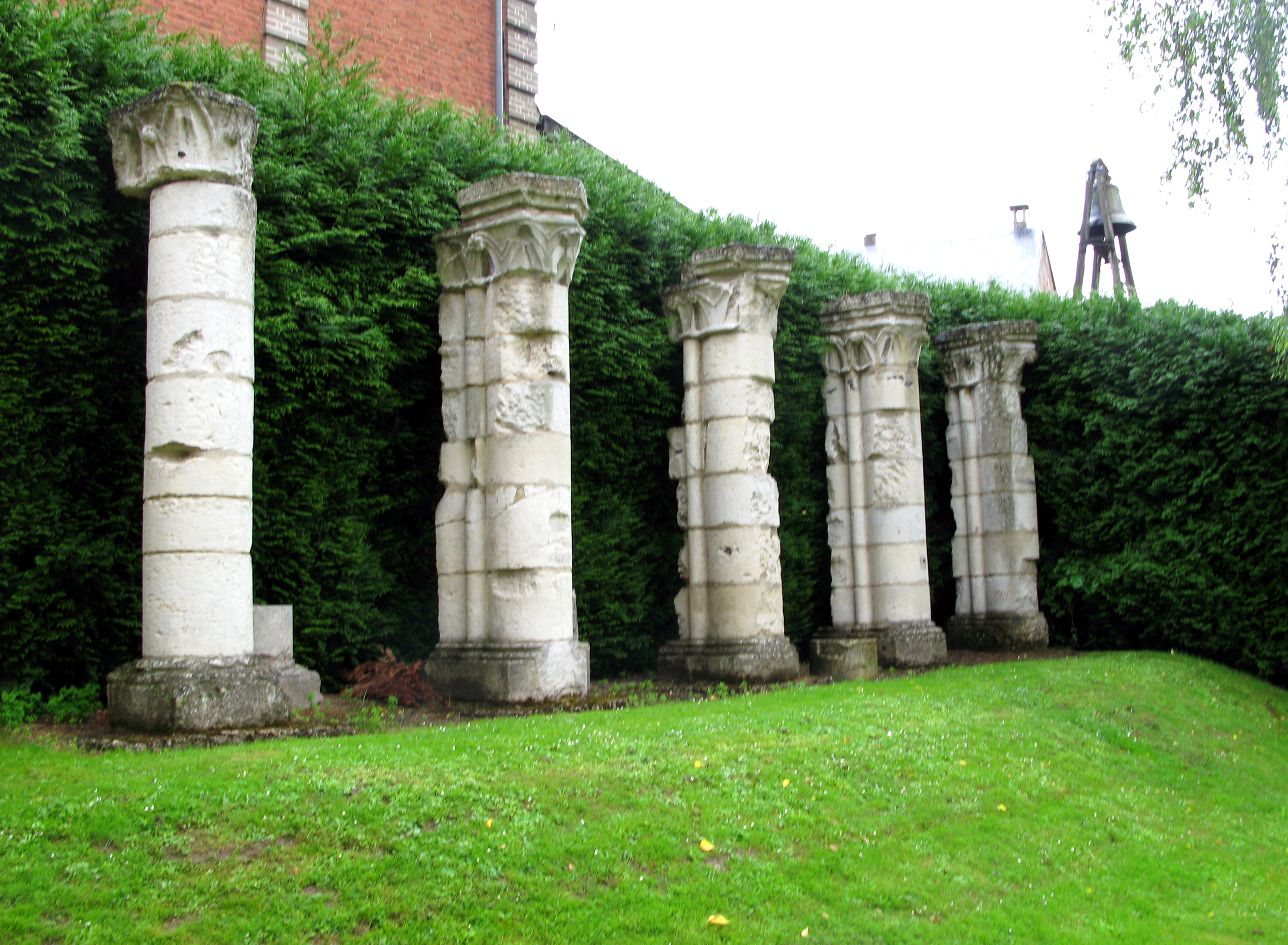 Longpré-les-Corps-Saints (Somme, France) - .